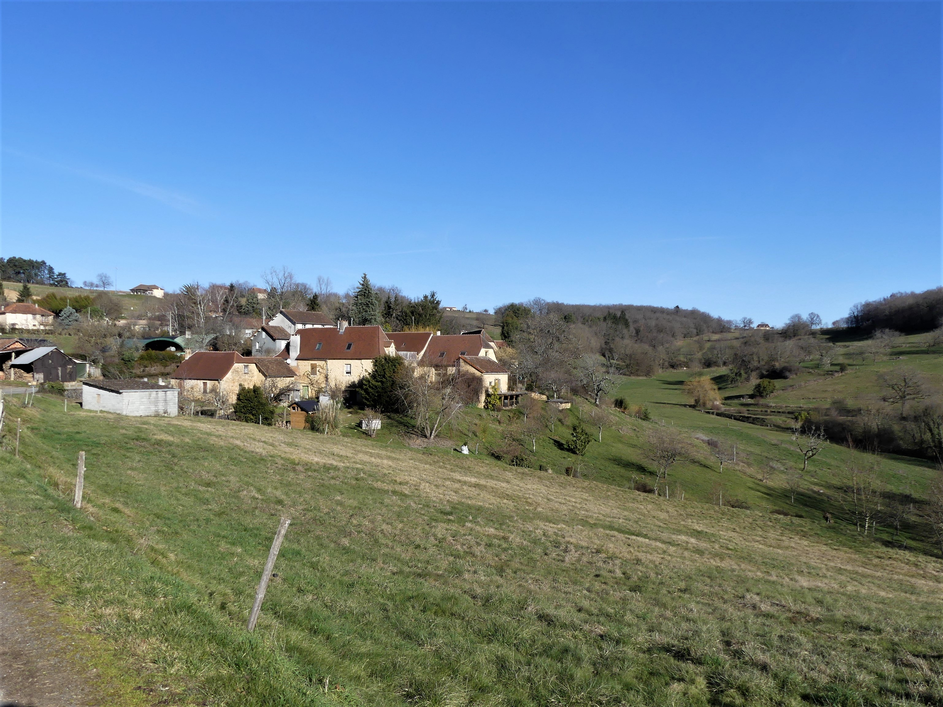 Le Bourmier, village de la commune d'Anlhiac, Dordogne, France.